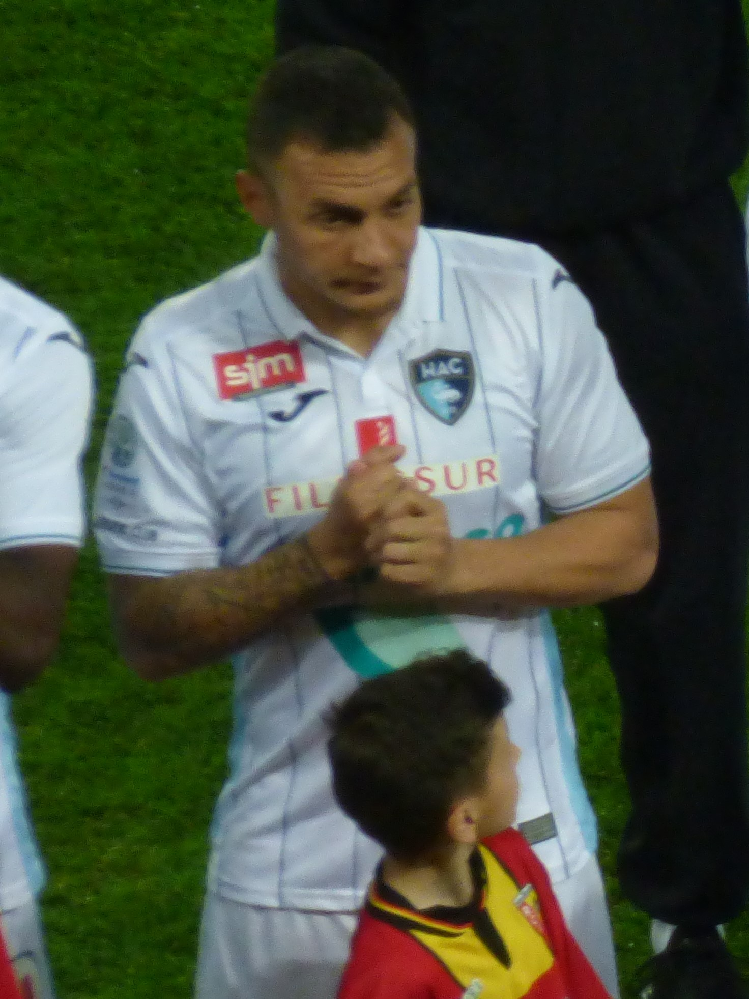 Jean-Pascal Fontaine avant le match Lens / Le Havre, comptant pour la 30ème journée du championnat de France de Ligue 2 2018-2019, le 1er avril 2019 au Stade Bollaert-Delelis.